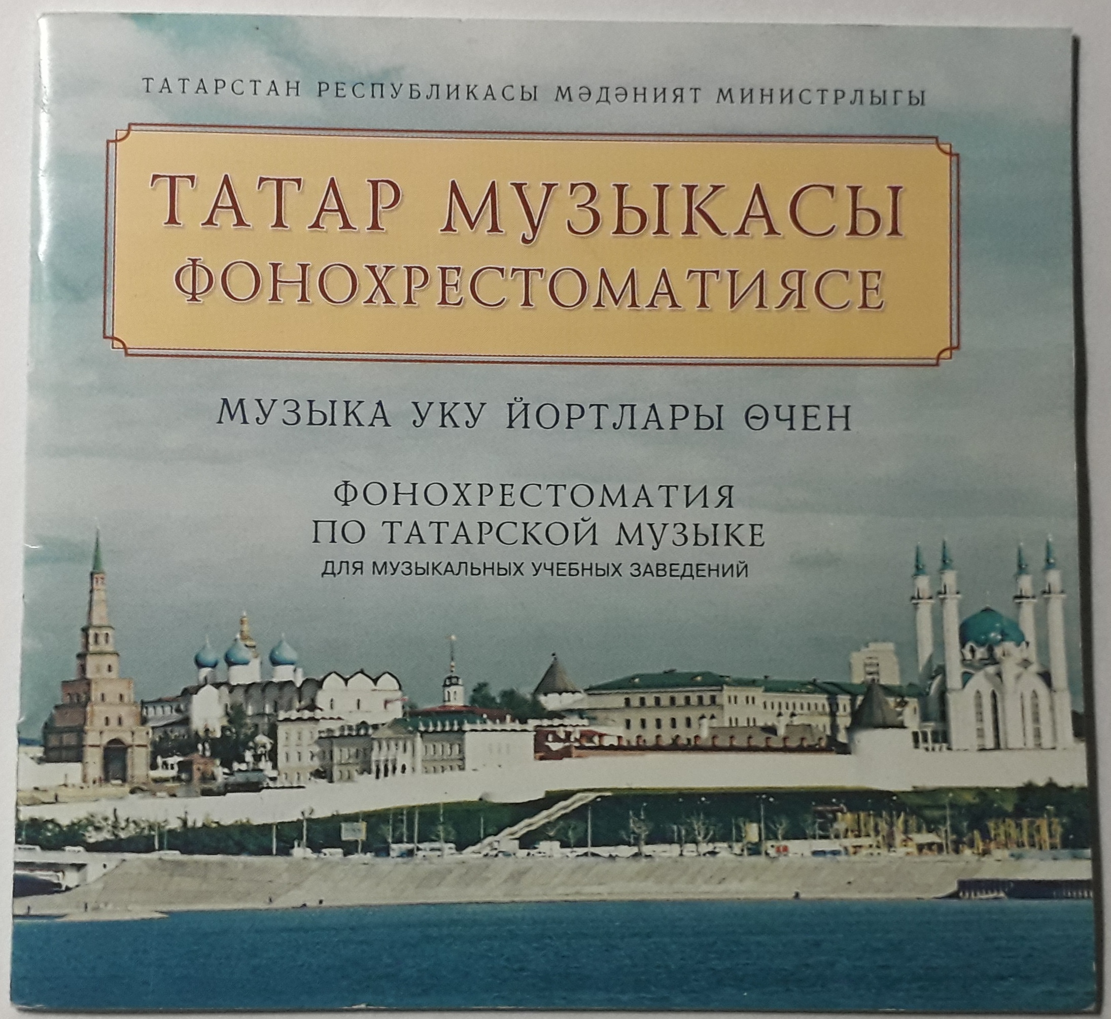 Татарча/tatarça: Музыка мәктәпләрендәге укучылар өчен төзелгән татар музыкасы тупланмасы